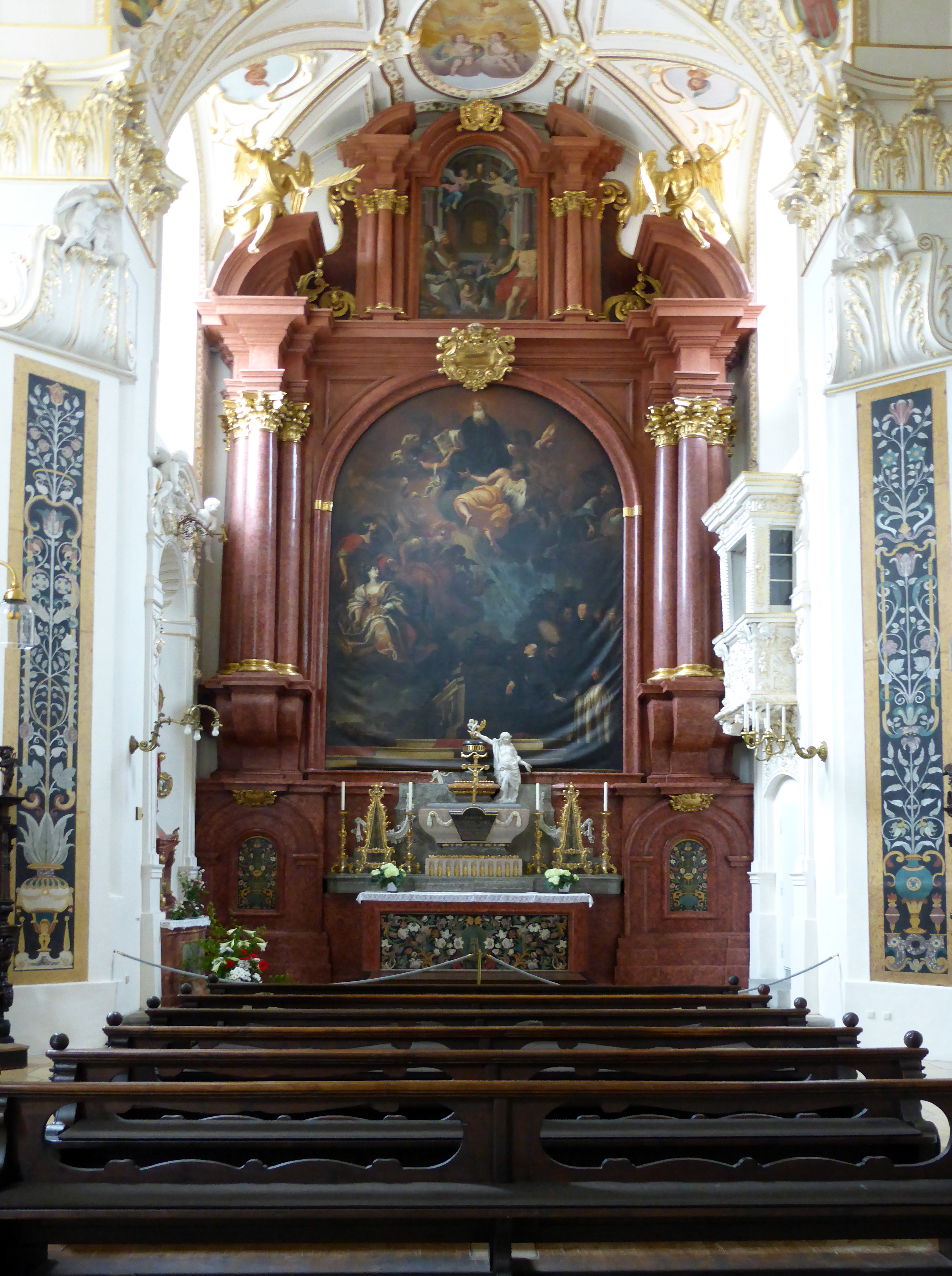 Wikipedia:Süddeutschland-Treffen im Mai 2016 in Kempten im Allgäu. Basilika St. Lorenz, Seitenkapelle.